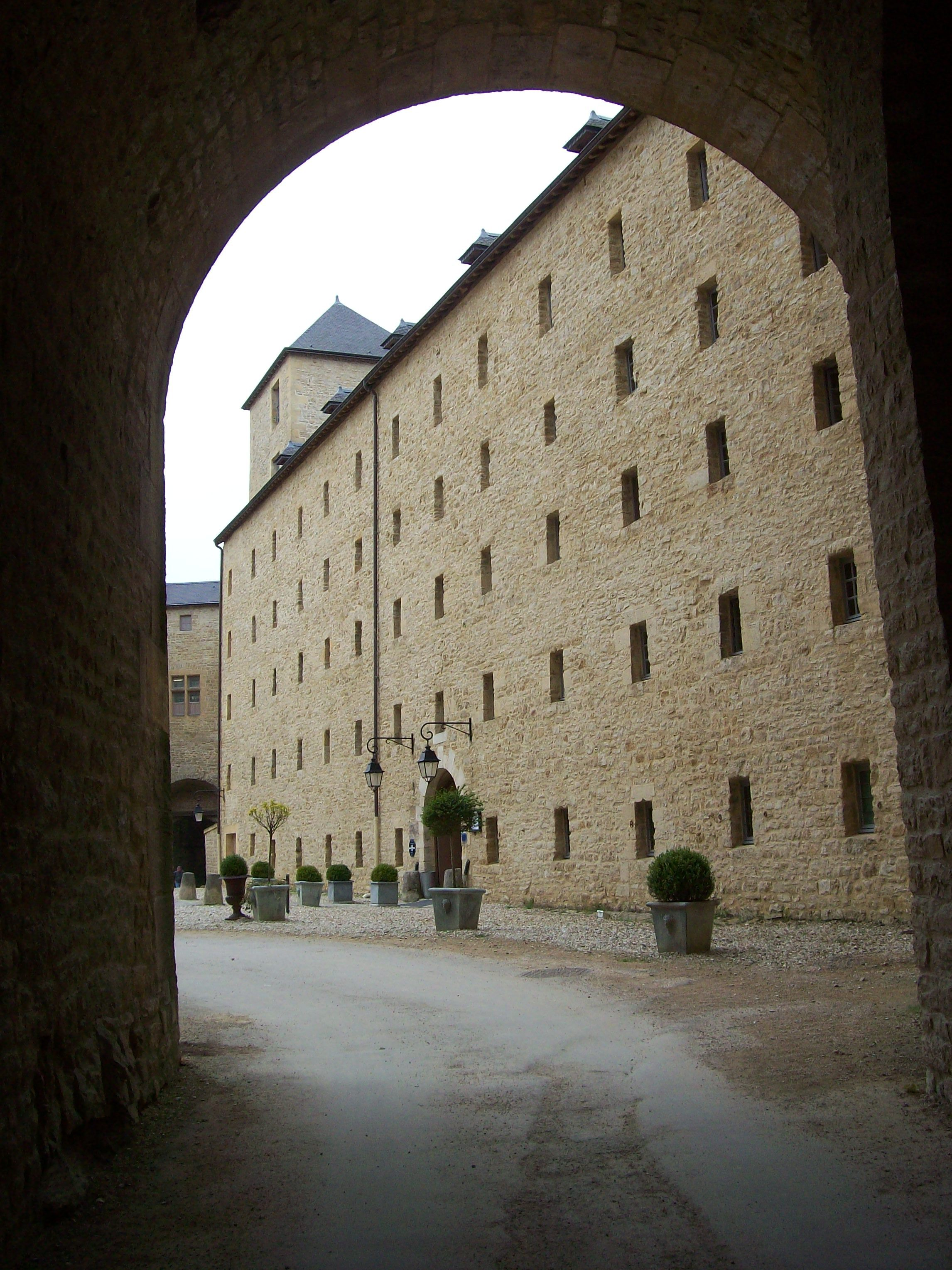 L'Hôtel du Château — Sedan, Champagne-Ardenne, France